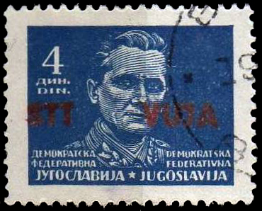 Почтовая марка Свободной территории Триест (Зона "Б") Free Territory of Trieste, Zone B (STT-VUJA: Free territory of Trieste, Military administration of Yugoslav Army)